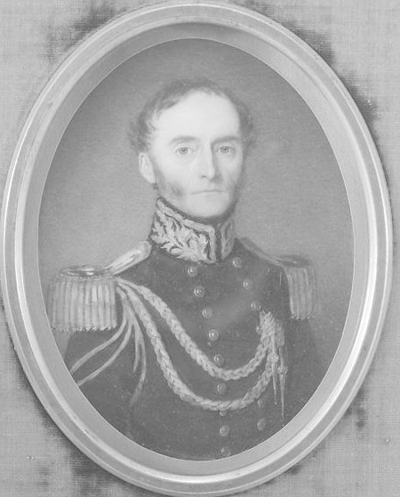 Jubal Anderson Early gemalt als Miniatur 10 x 7,6 cm.